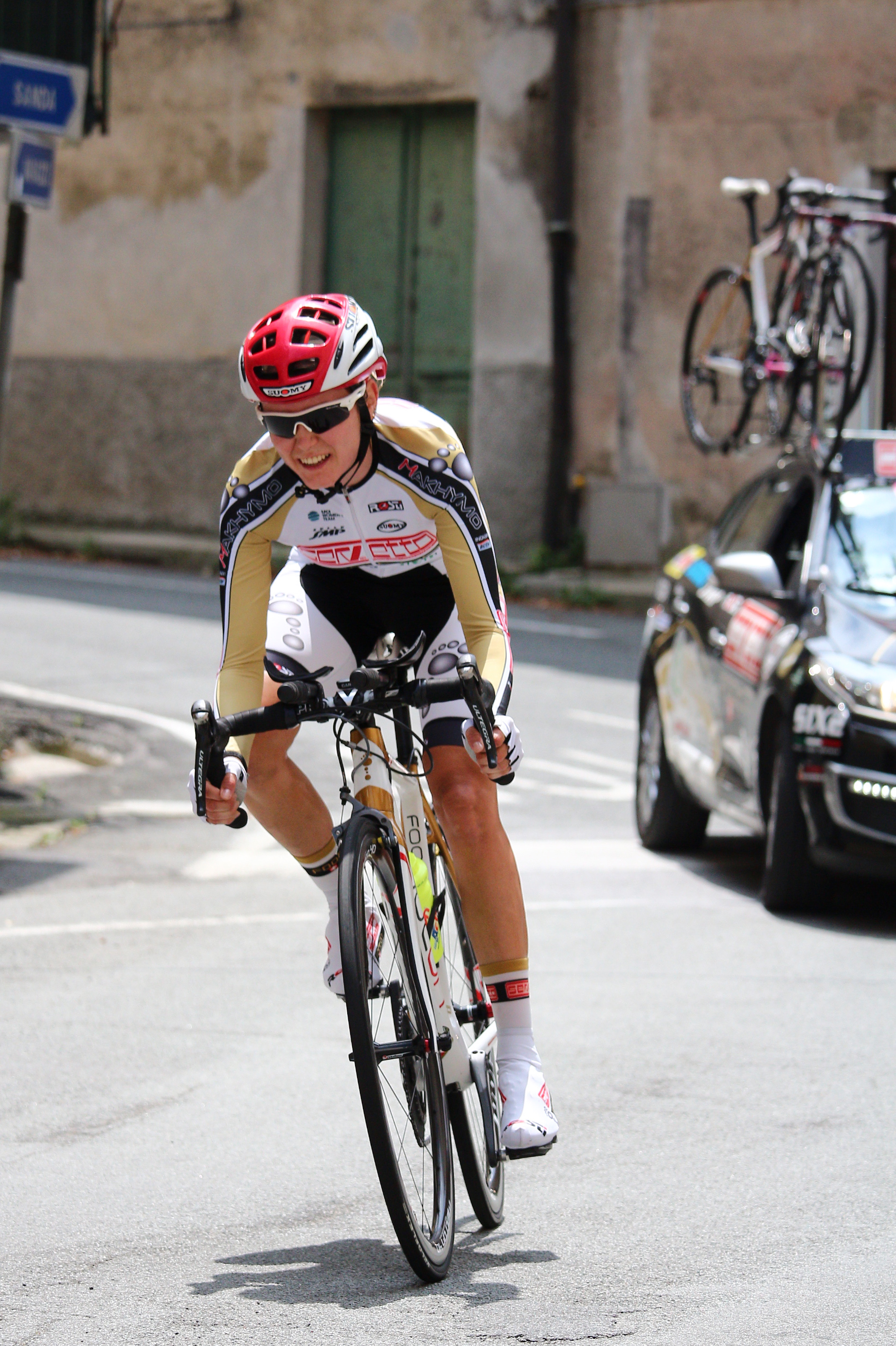 Anna Potokina during the 7th stage of Giro Rosa 2016 in Stella San Martino